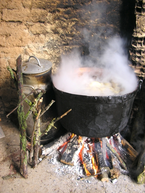 Marmita de cobre con las morcillas hirviendo dentro, durante el proceso de elaboración de la morcilla de Burgos en Sandoval de la Reina.